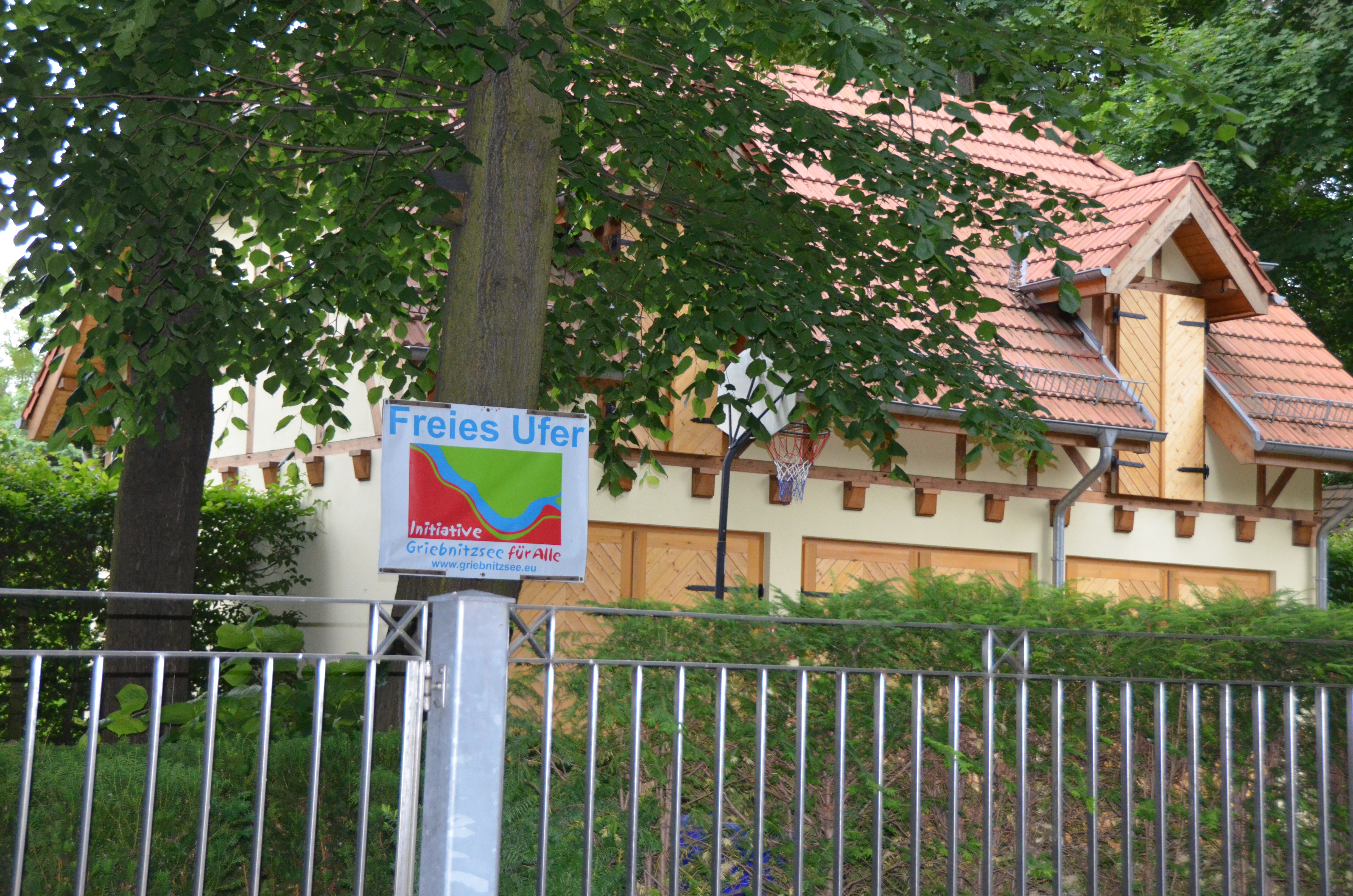 Nachbarn des Geburtshauses von Peter Weiss